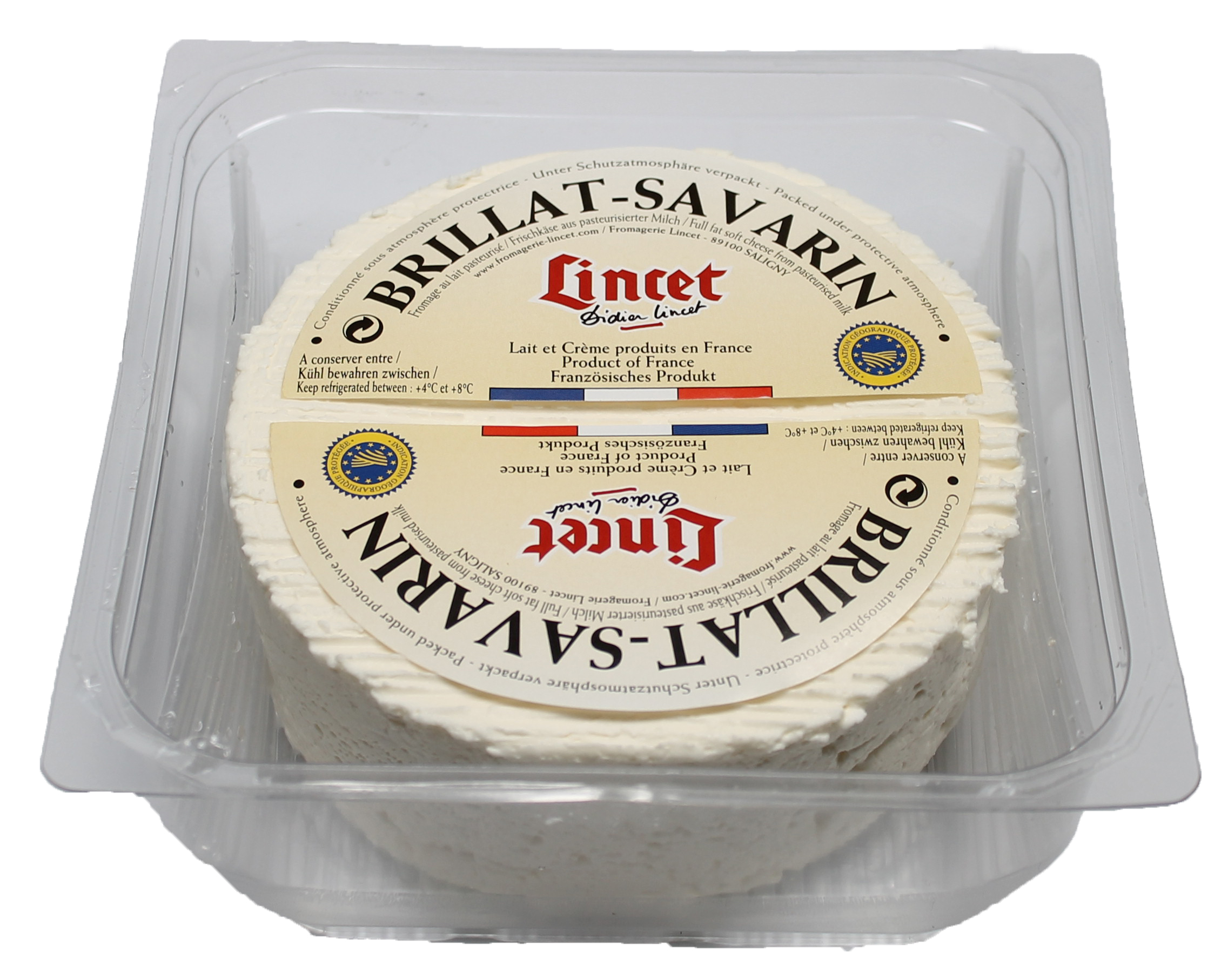 Brillat-Savarin IGP Lincet Non-affiné